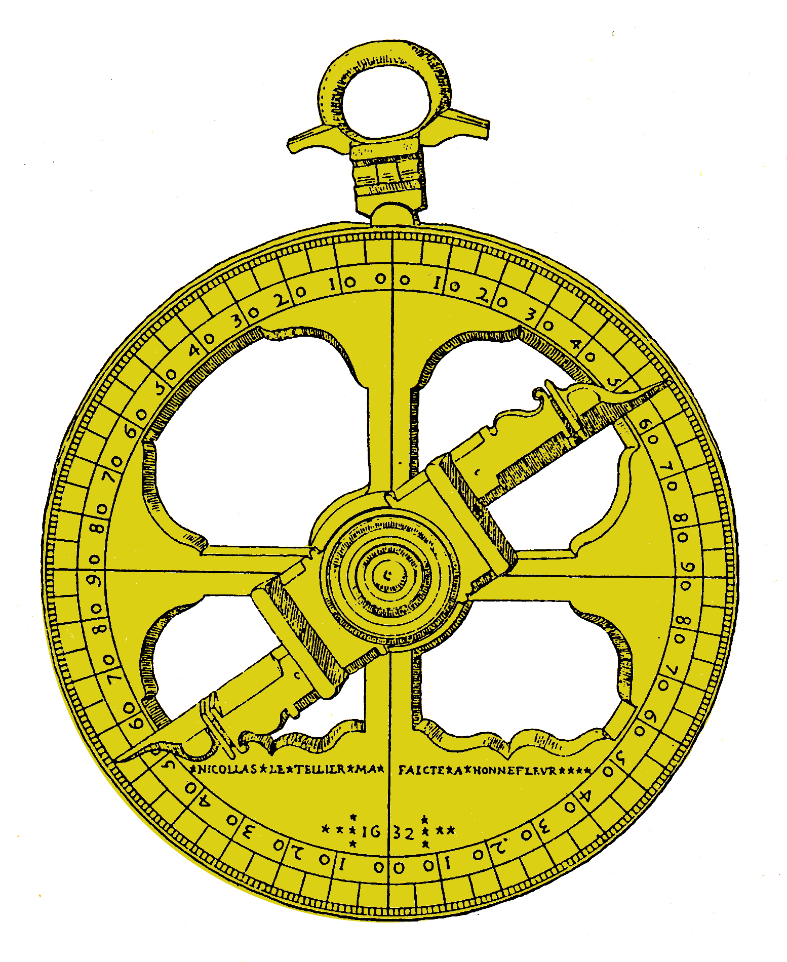 Gravure ancienne, d'un auteur inconnu, et colorisée d'un astrolabe nautique du musée Brochet de Caudebec-en-Caux, Calvados. Cet instrument a été détruit pendant la Première Guerre Mondiale.